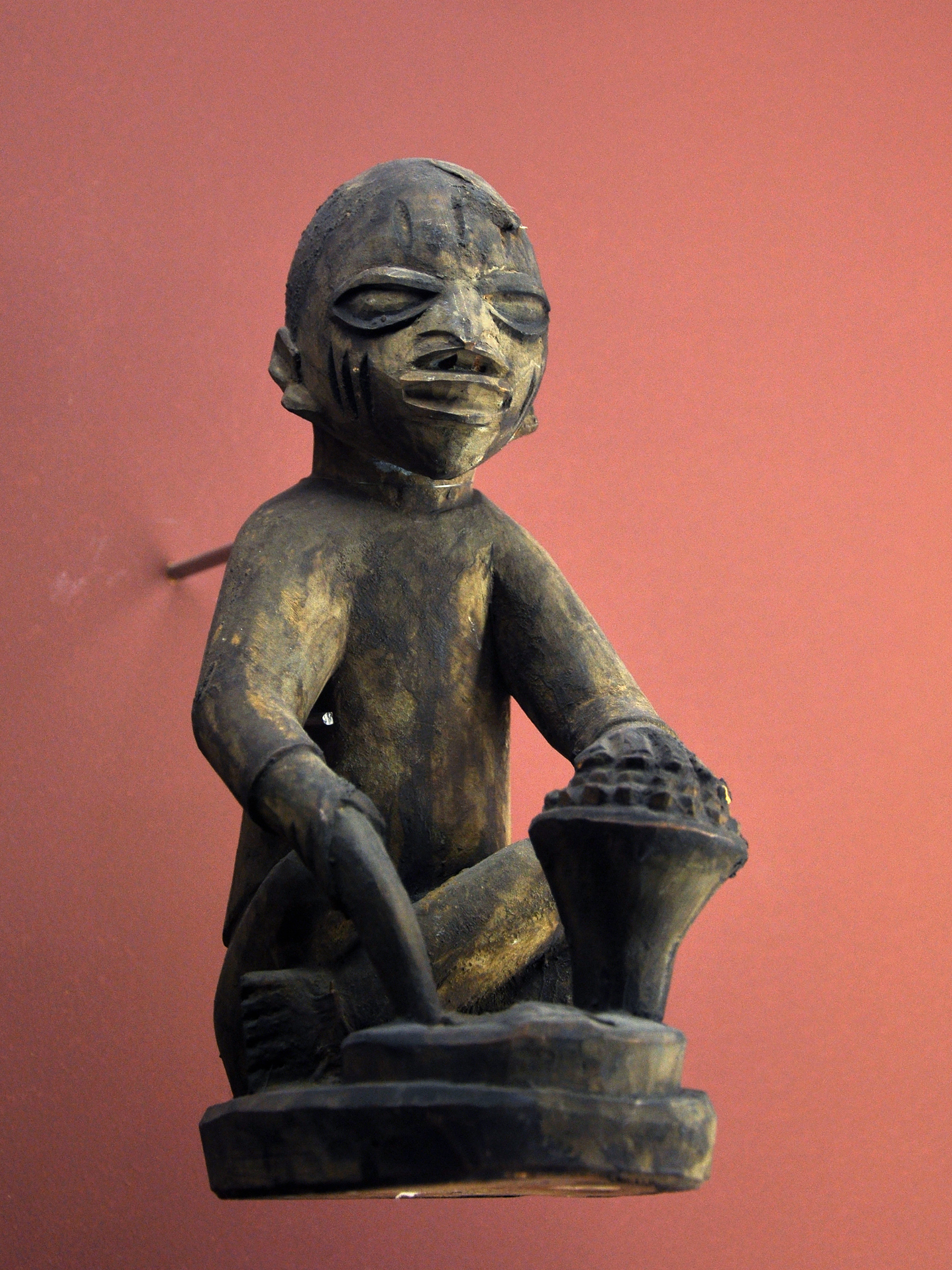 Statuette représentant un Orisha ( divinité ), culture Yoruba, fin du 19ème siècle. Provient d'Abeokuta au Nigéria. Musée africain à Lyon.